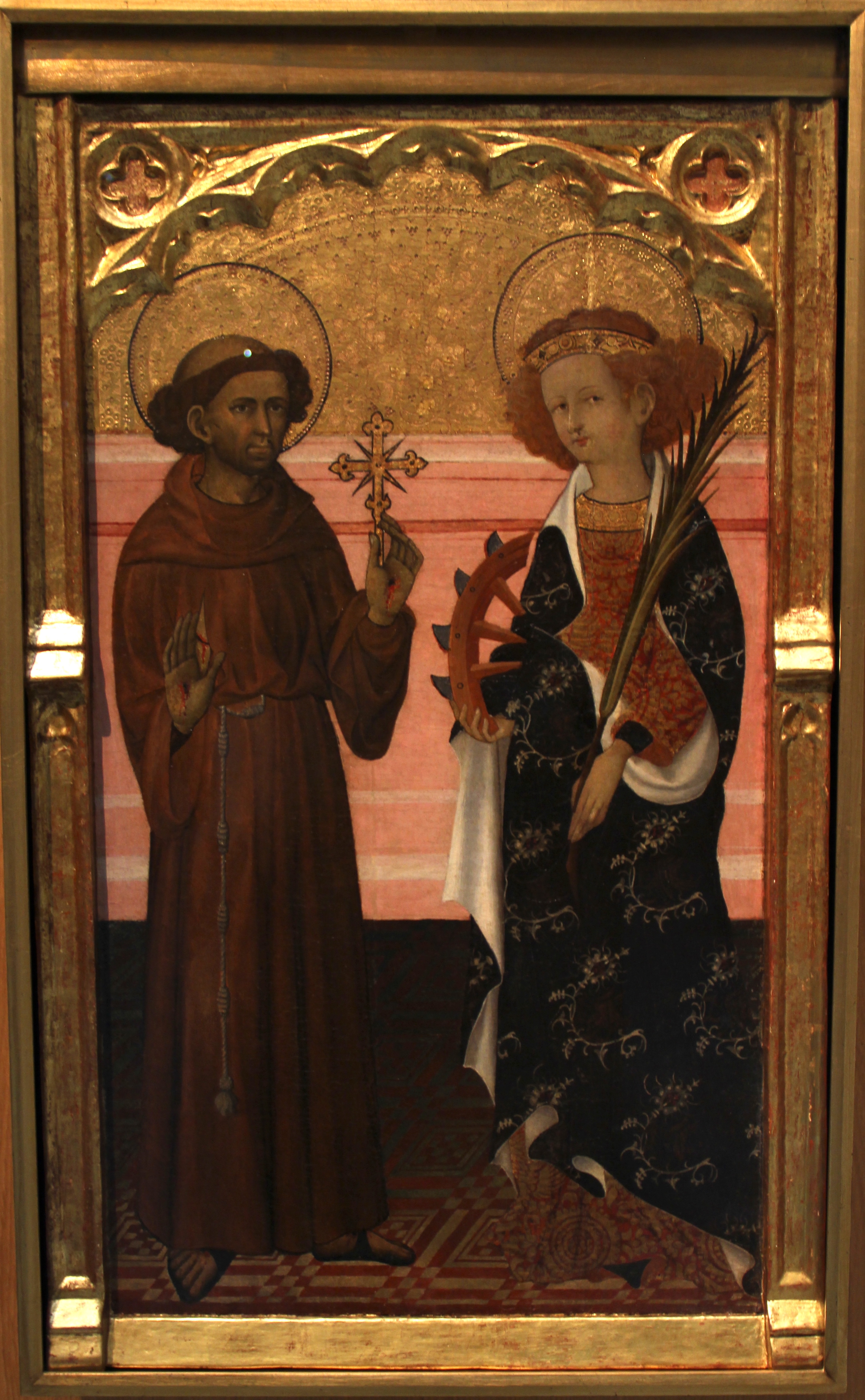 Rencontre entre François d'Assise et Catherine d'Alexandrie.